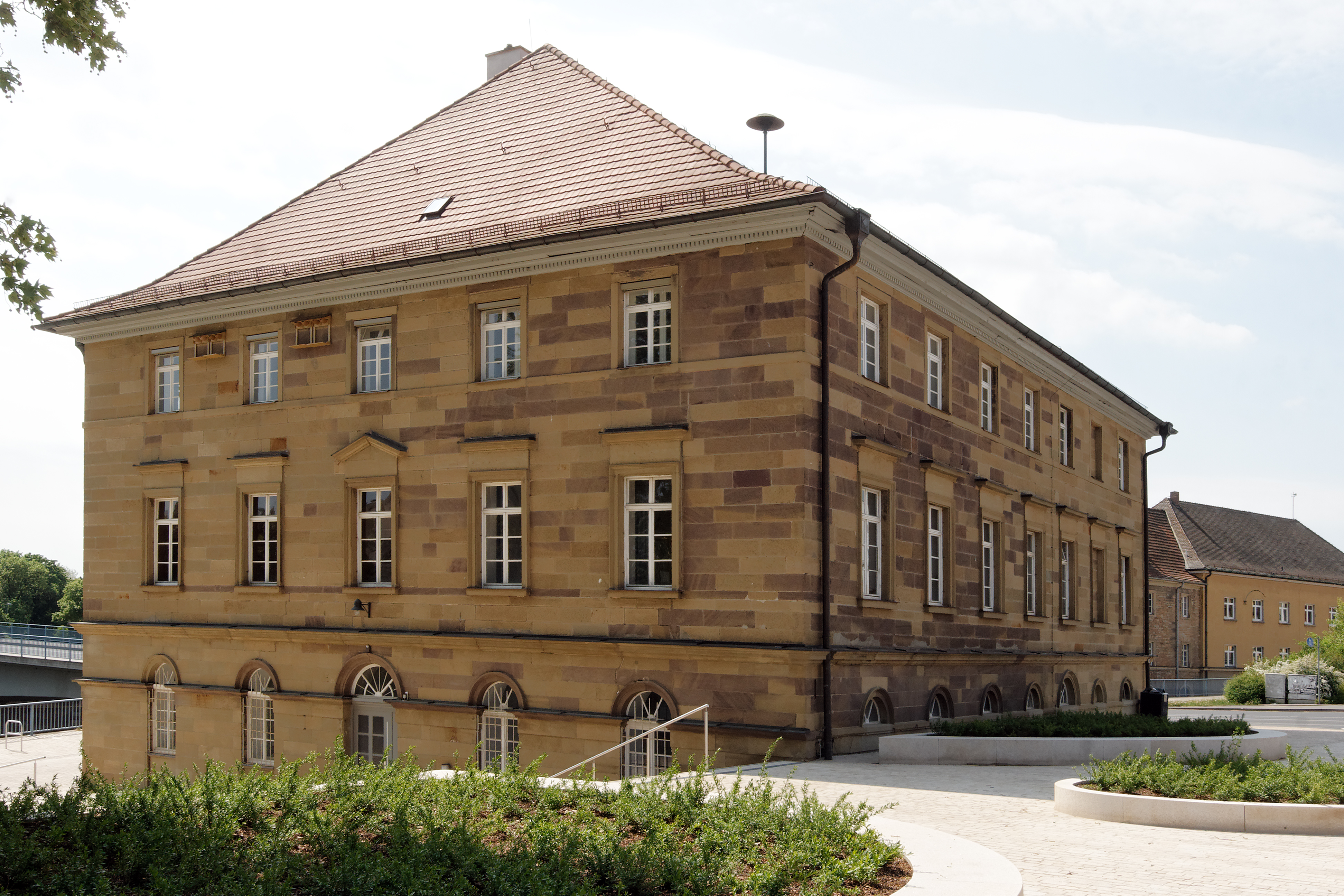 Harmonie-Gebäude in Schweinfurt, Sandsteinquaderbau, erbaut 1833-1835 von Anton Daug in klassizistischem Stil. Zunächst Vereinslokal dr Harmonie-Gesellschaft und öffentlich zugängliche Restauration (1872-1913), 1919 an die Stadt verkauft und seither von der Stadtverwaltung genutzt. In dem Gebäude befindet sich ein naturkundliches Museum. 1959 wurde das Gebäude an der Westseite um fünf Meter verkürzt, um Platz für die Auffahrt der neuen Maxbrücke zu schaffen.